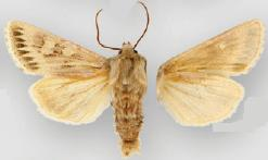 Psammopolia insolens male